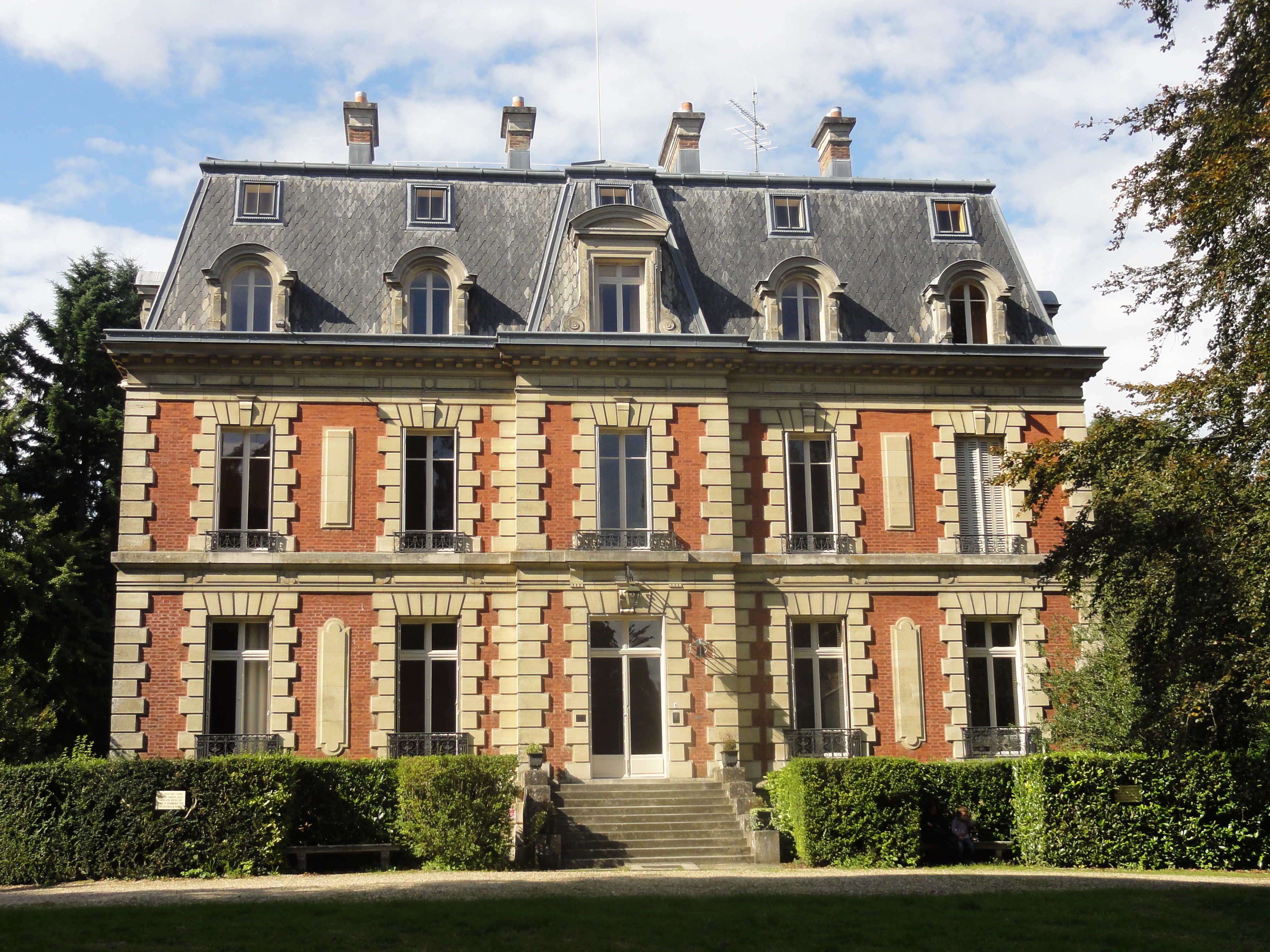 Château, vue depuis le sud.